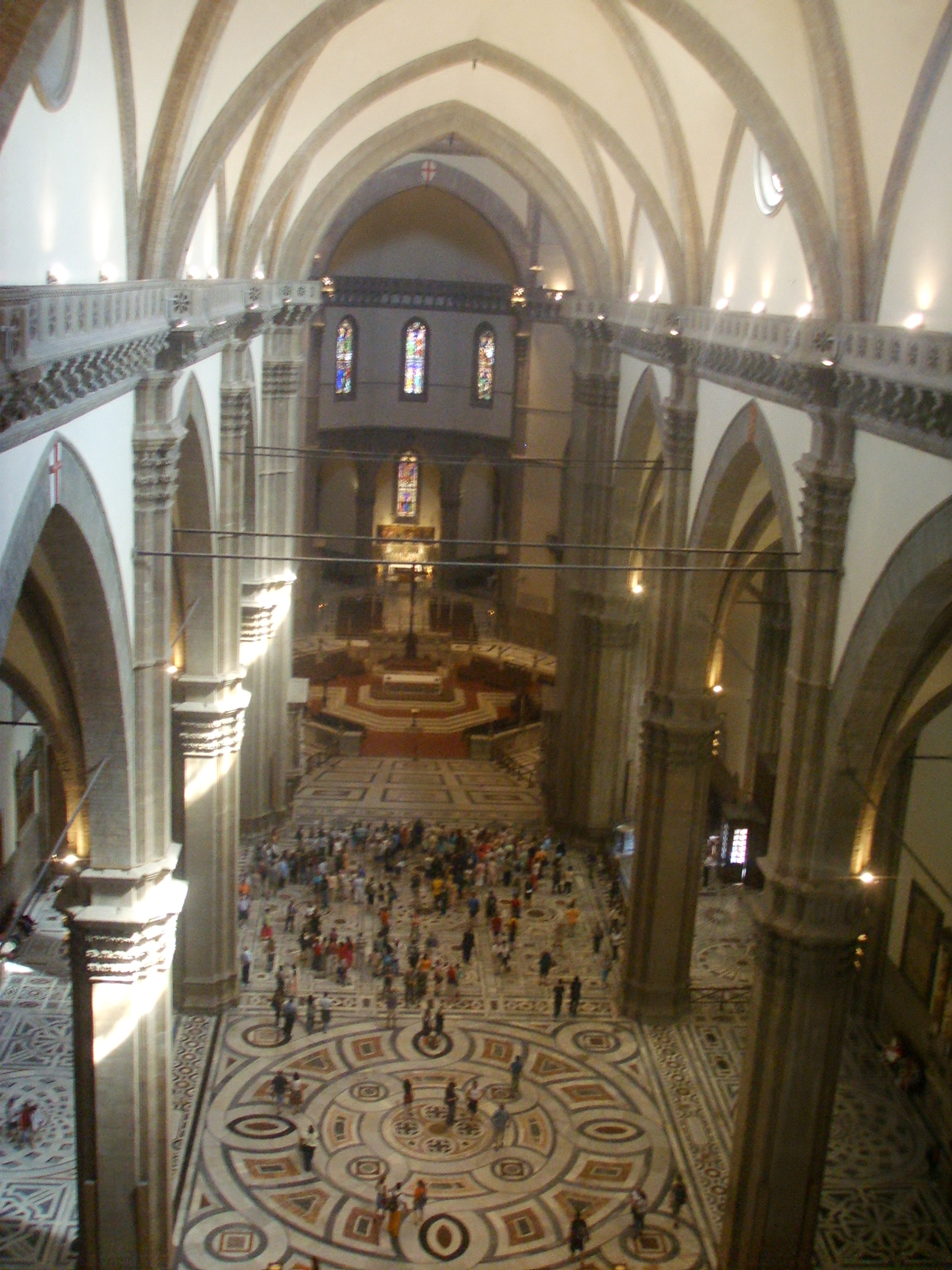 Navata centrale di Santa Maria del Fiore a Firenze.